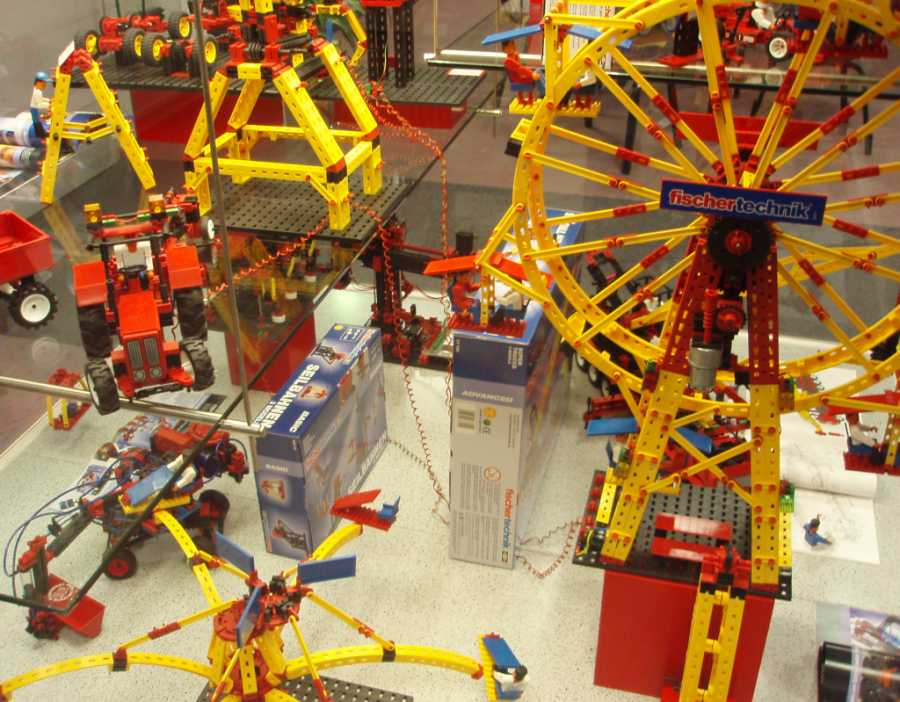 fischertechnik